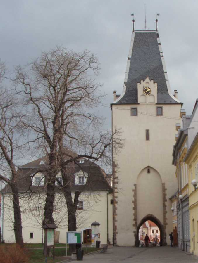 Česky: Mikulovická brána, Kadaň. Česky: Mikulovice Gate, Kadaň, Czech Republic.